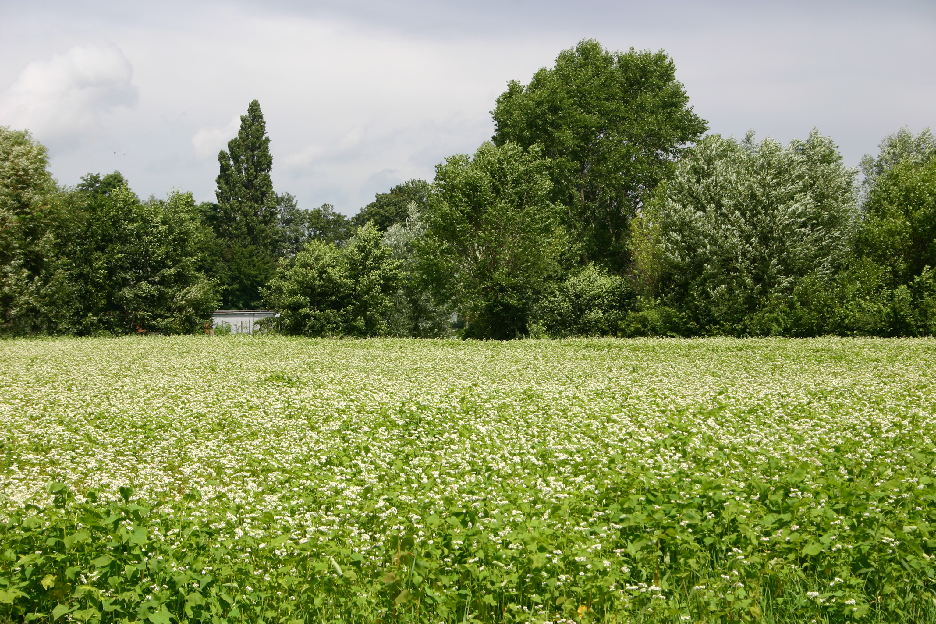 Boekweiveld in volle bloei Stadsgroen Venning GFDL Eigen werk